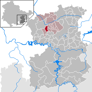 Bodelwitz in Thuringia - Saale-Orla-Kreis